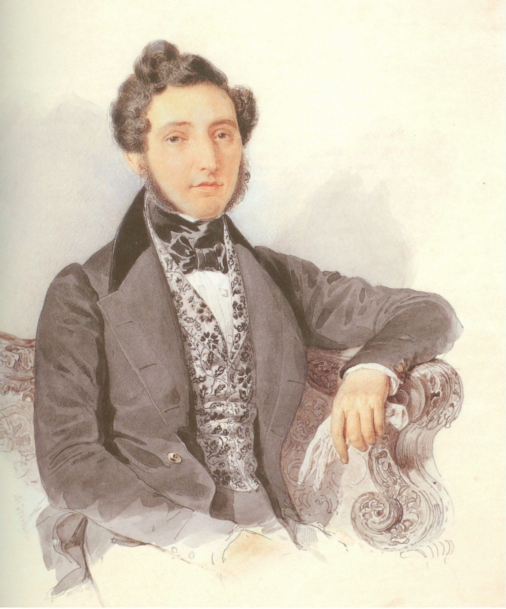 Иван Михайлович Донауров (1806/07-1849)